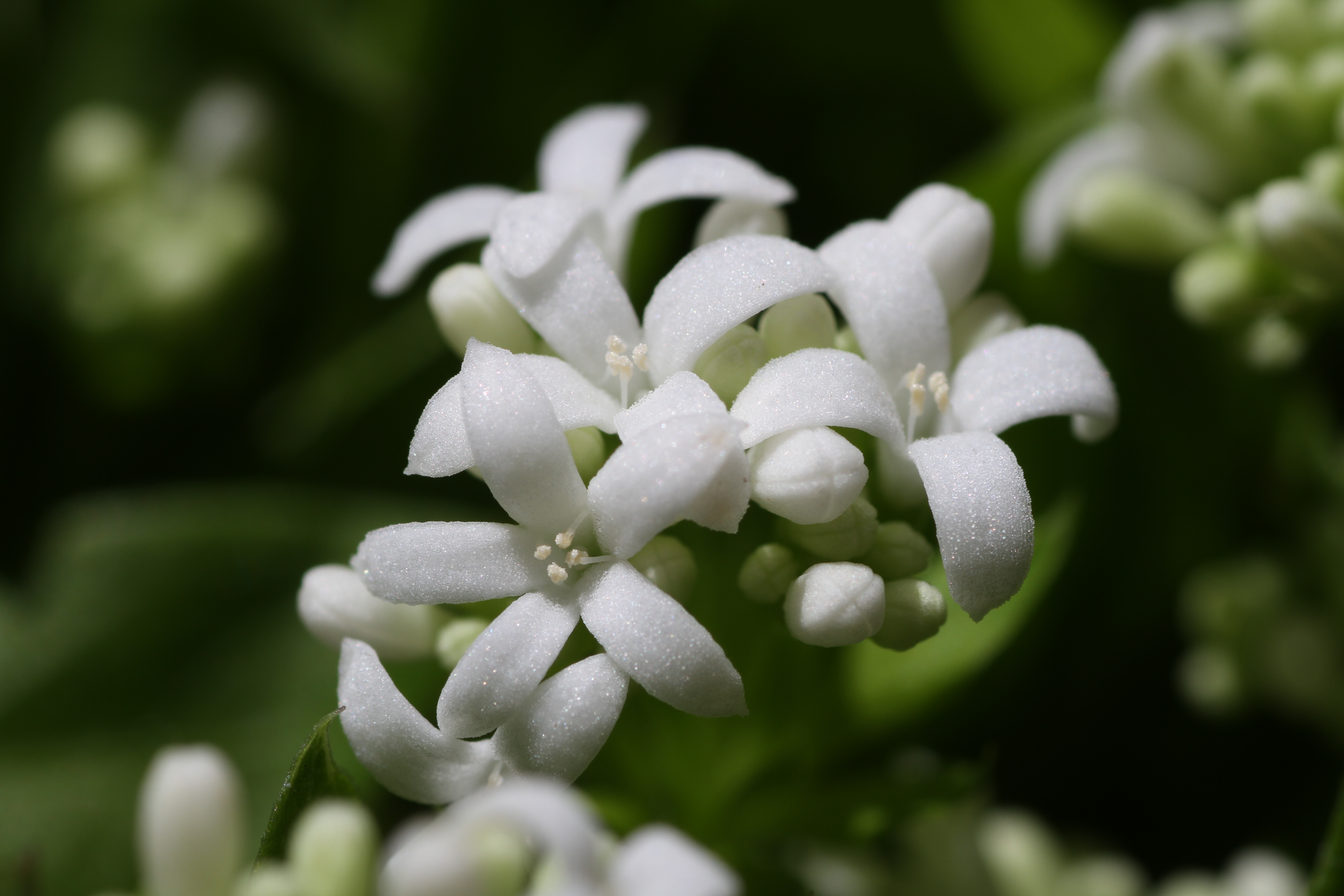 Nahaufnahme von Waldmeister-Blüten (Galium odoratum)